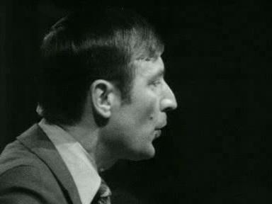 CDA-lijsttrekker Van Agt in 1977.